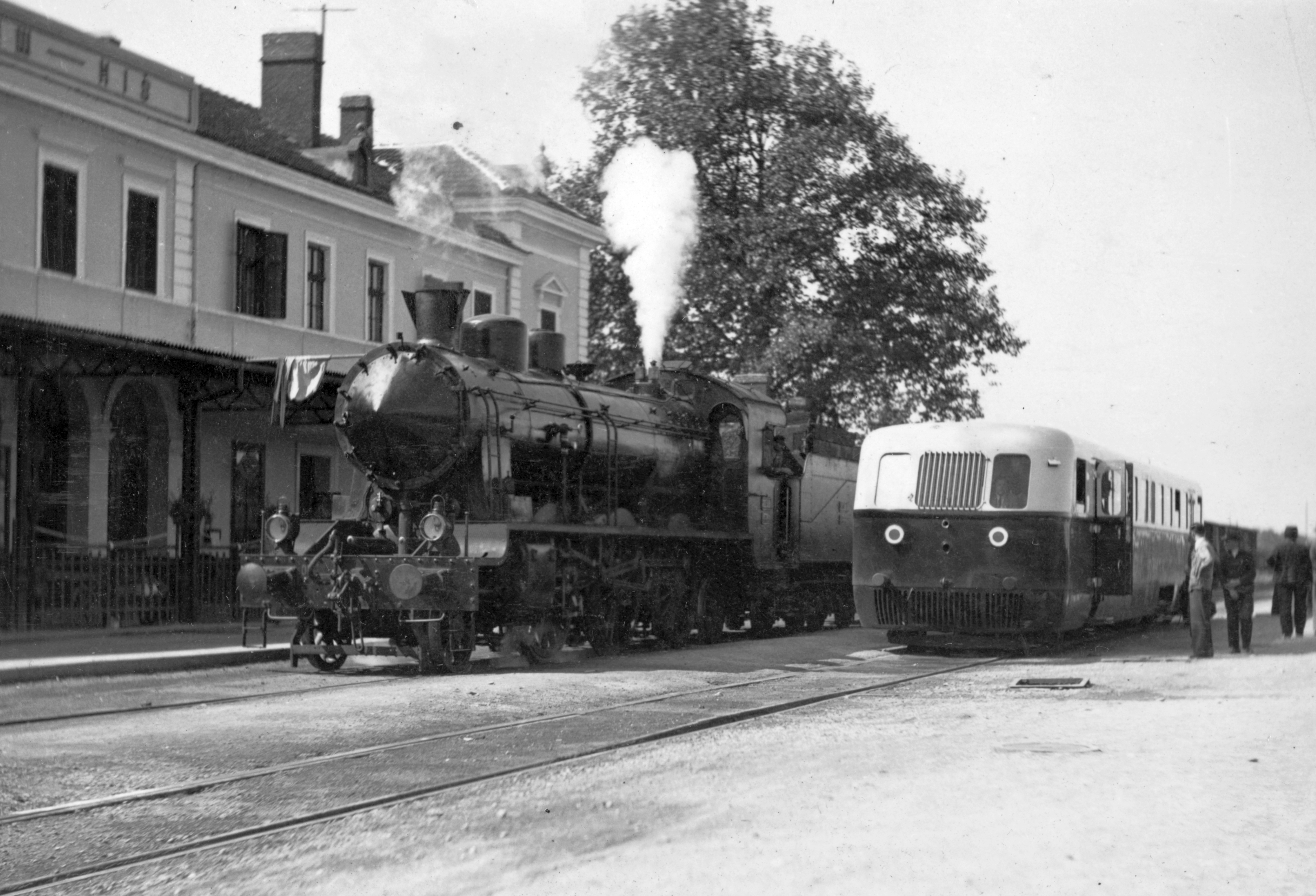 Ganz gyártmányú Árpád sorozatú (TAS) sínautóbusz. Location: Serbia Tags: steam locomotive, rail, railway, Hungarian brand, Ganz-brand, train station, building Title: Ganz gyártmányú Árpád sorozatú (TAS) sínautóbusz.